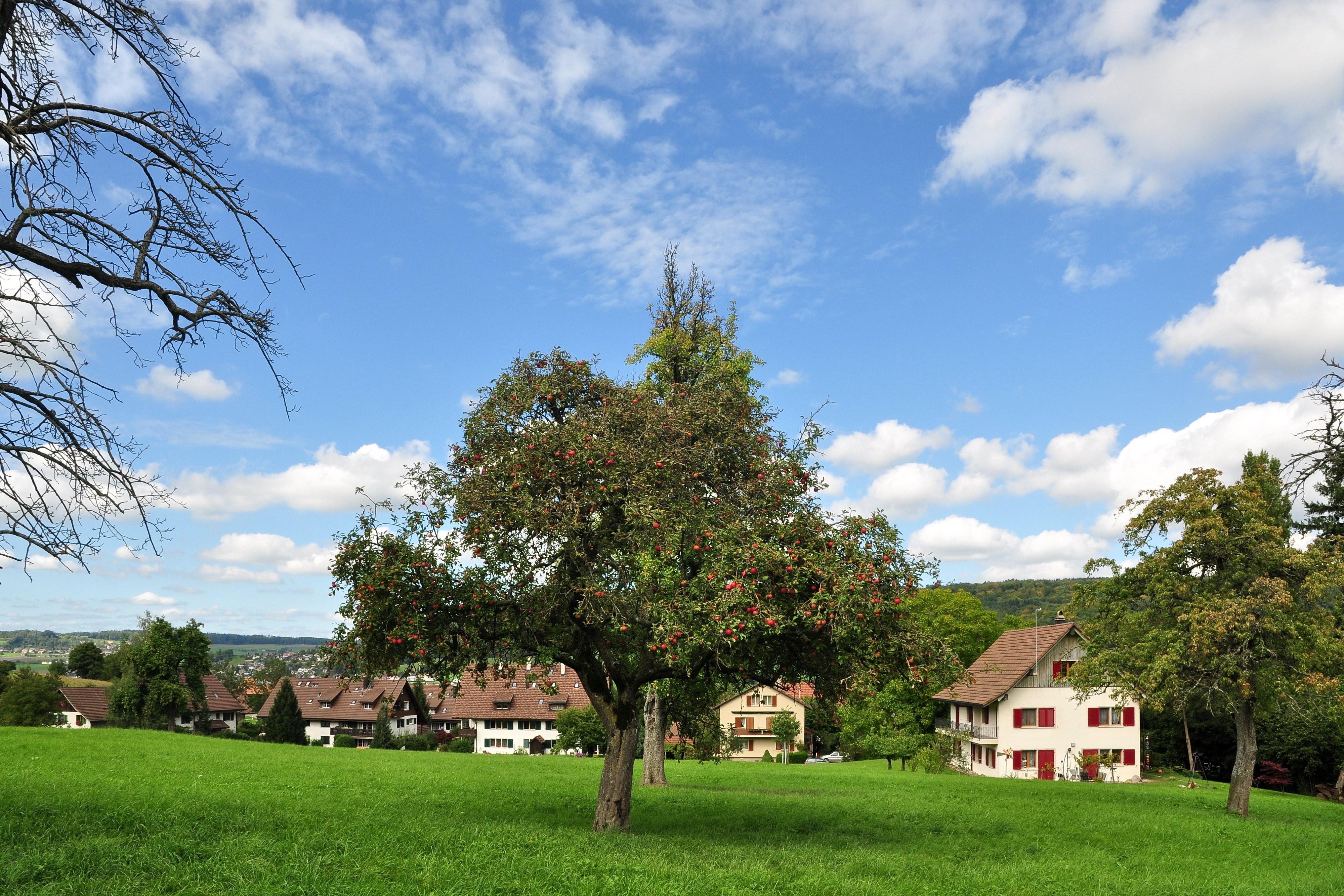 Dachsleren in Schleinikon (Switzerland)